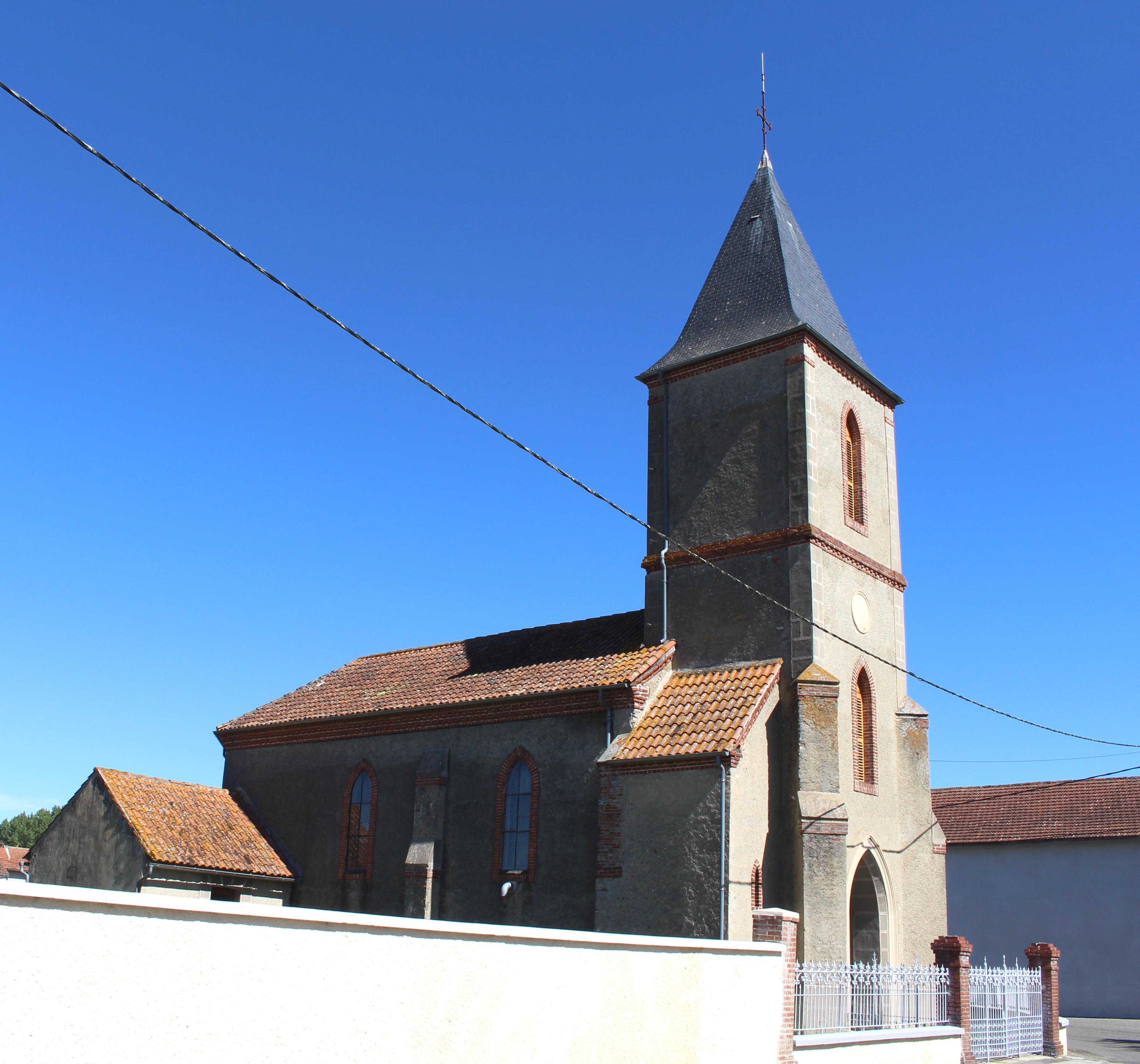 Église de l'Assomption de Gensac (Hautes-Pyrénées)